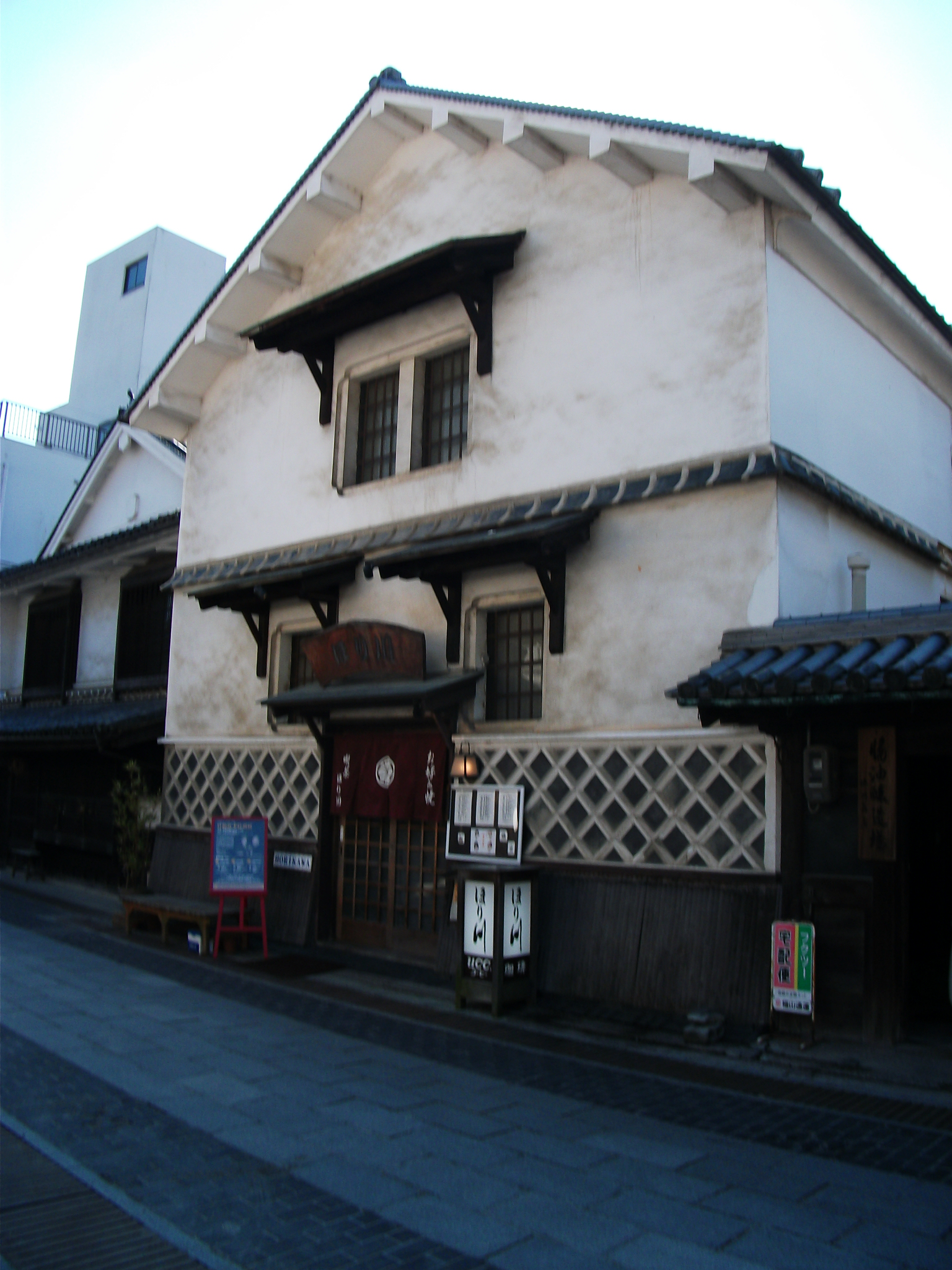 広島県竹原市、お好み焼き店ほり川